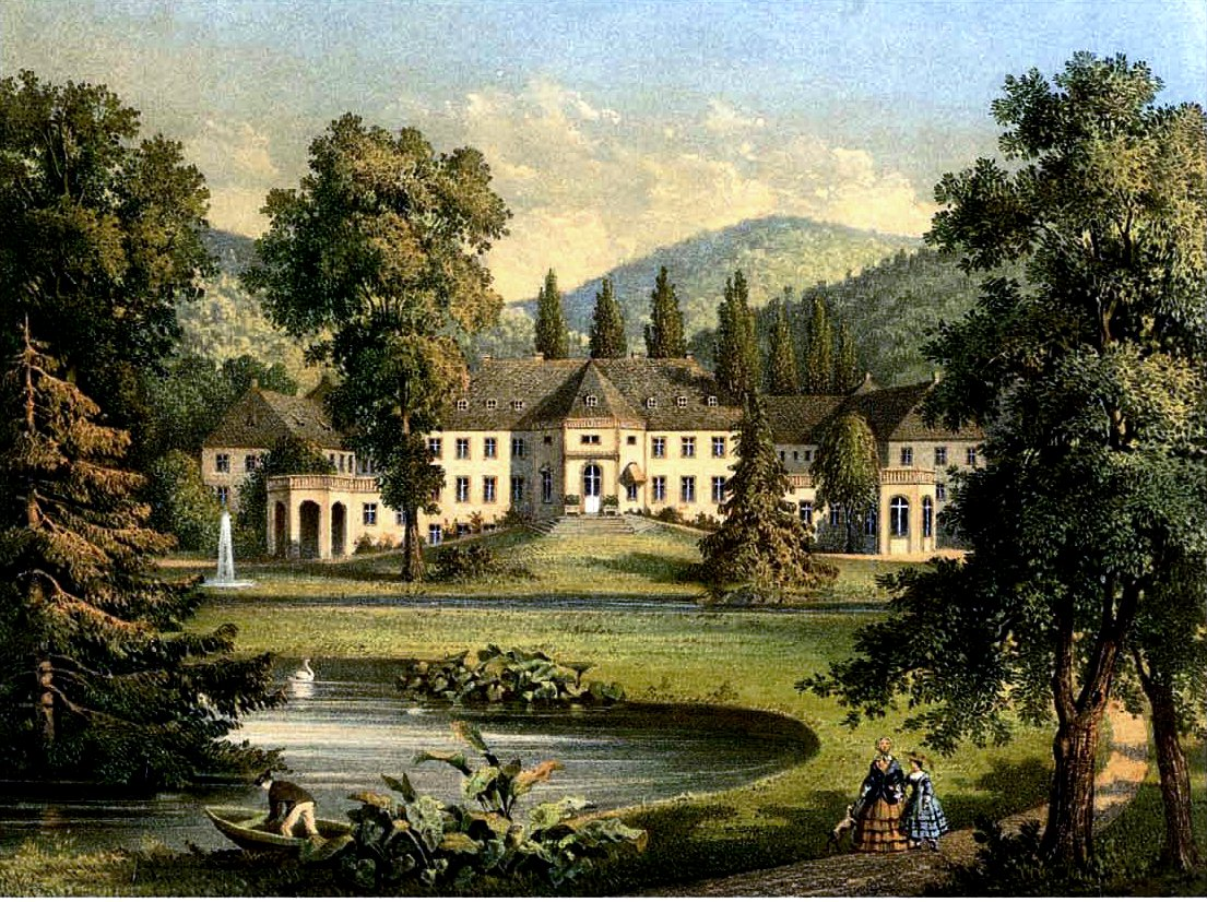 Schloss Rheder, Lithografie aus dem 19. Jahrhundert